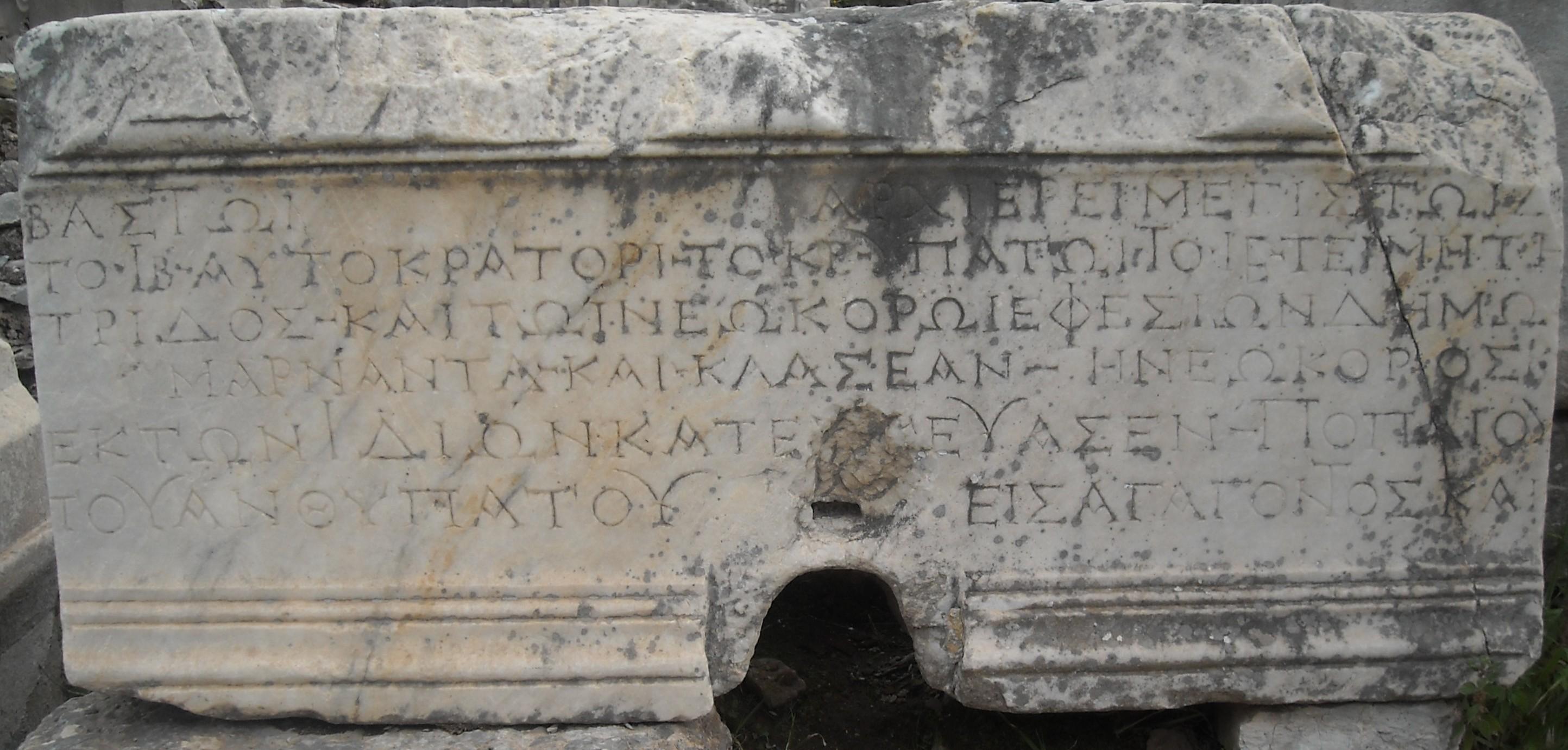 Inscription à Ephèse